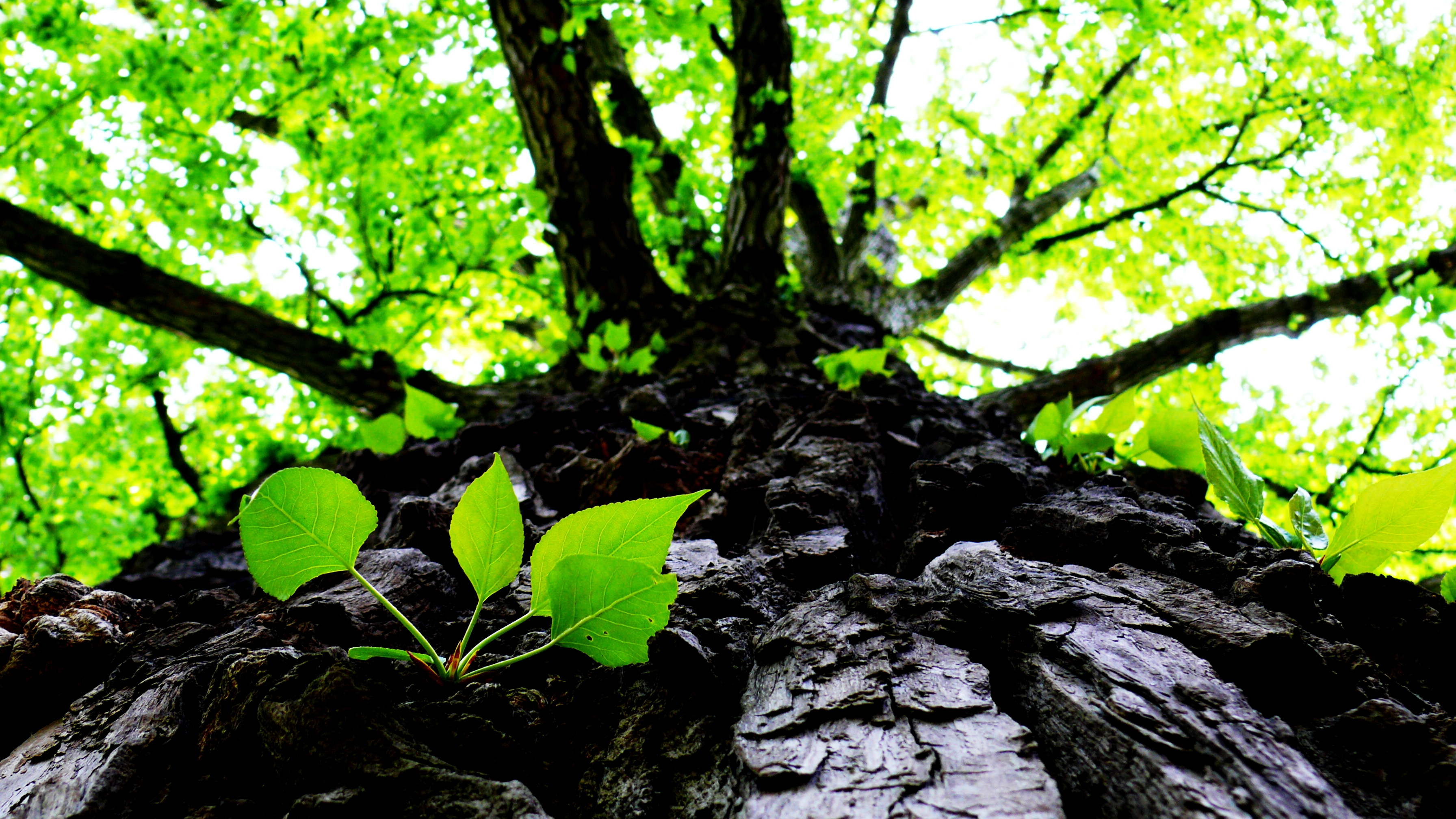 Neue Blätter treiben durch die alte Rinde aus